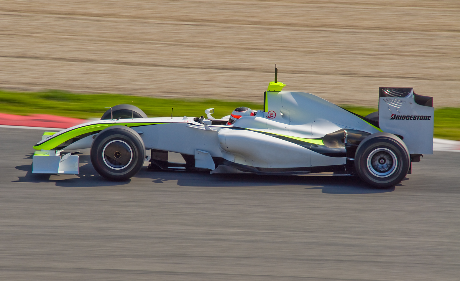 Nikon D90 + Sigma 18-200 DC OS HSM 1/200s - F/18 - 200mm - ISO200